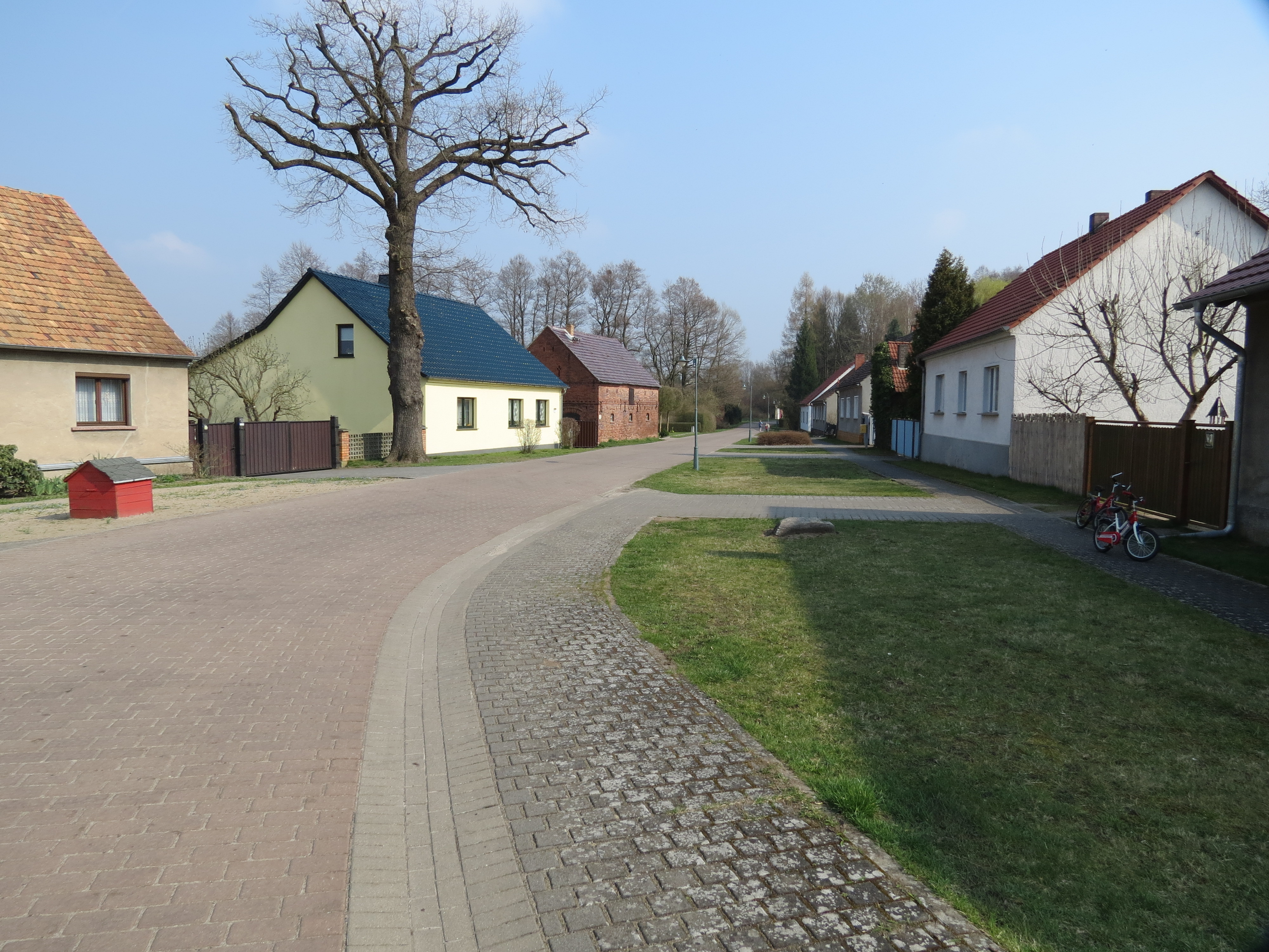 Blasdorf, Ortsteil der Stadt Lieberose, Lkr. Dahme-Spreewald, Brandenburg, Deutschland, Dorfstraße etwa Höhe Blasdorf 3/4, Blick nach Südosten